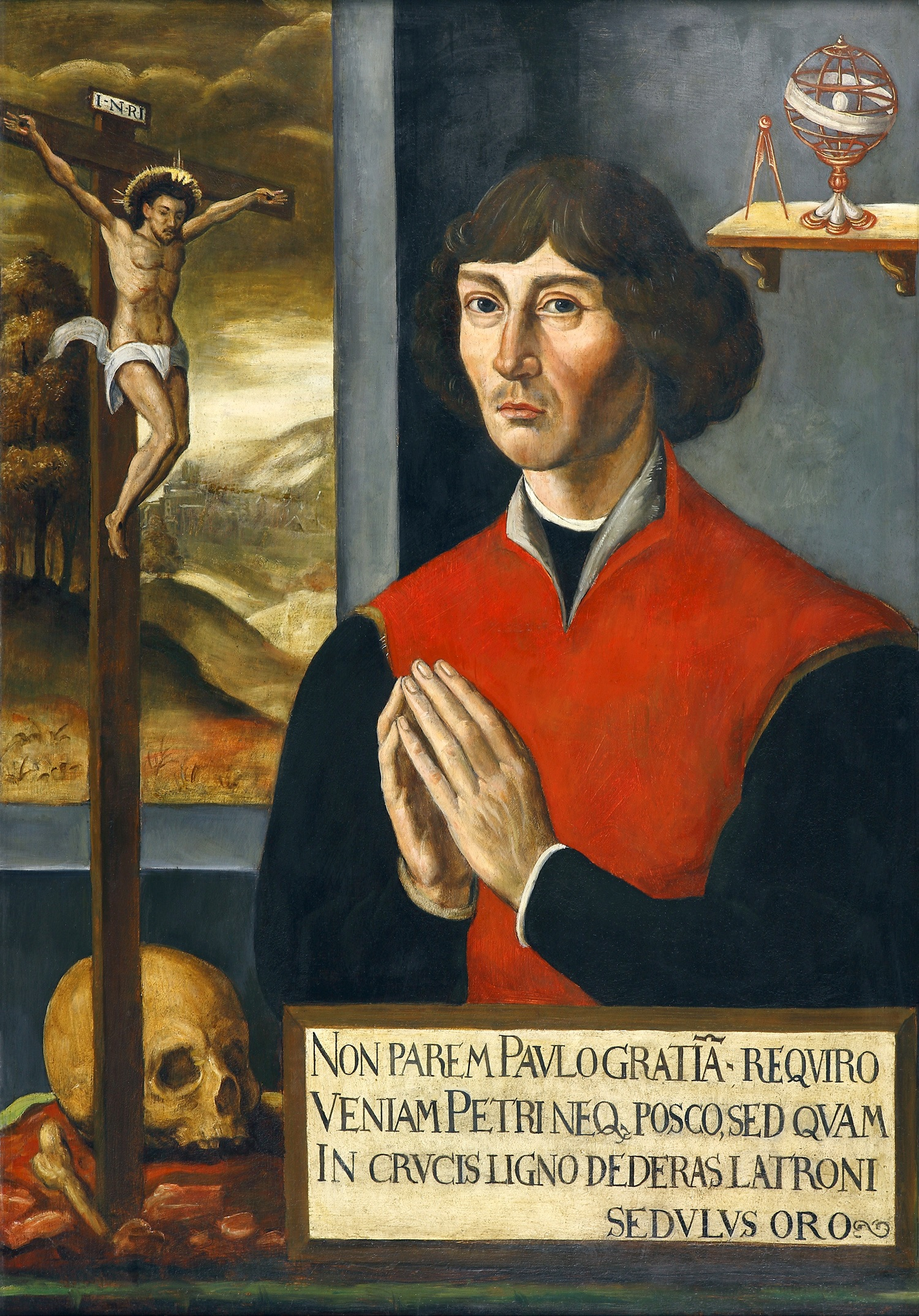 Ausschnitt aus dem Kopernikus-Epitaph der Johanniskirche in Thorn, aus dem Jahre 1589. Das Epitaph ist eines der ältesten Kopernikus-Bildnisse, um 1582 gestiftet vom Thorner Stadtphysikus Dr. Melchior Pyrnesius (gest. 1589). Der Spruch betont die Religiosität und Demut von Kopernikus. Er stammt von dem ehemaligen ermländischen Bischof und späteren Papst Pius II., Enea Silvio Piccolomini, und lautet auf deutsch: "Weder bitte ich um die gleiche Gnade, die dem Paulus gewährt wurde, noch suche ich die Vergebung, die Petrus fand, sondern ich bitte inbrünstig um diejenige, die Du am Kreuz dem Schächer gegeben hat."